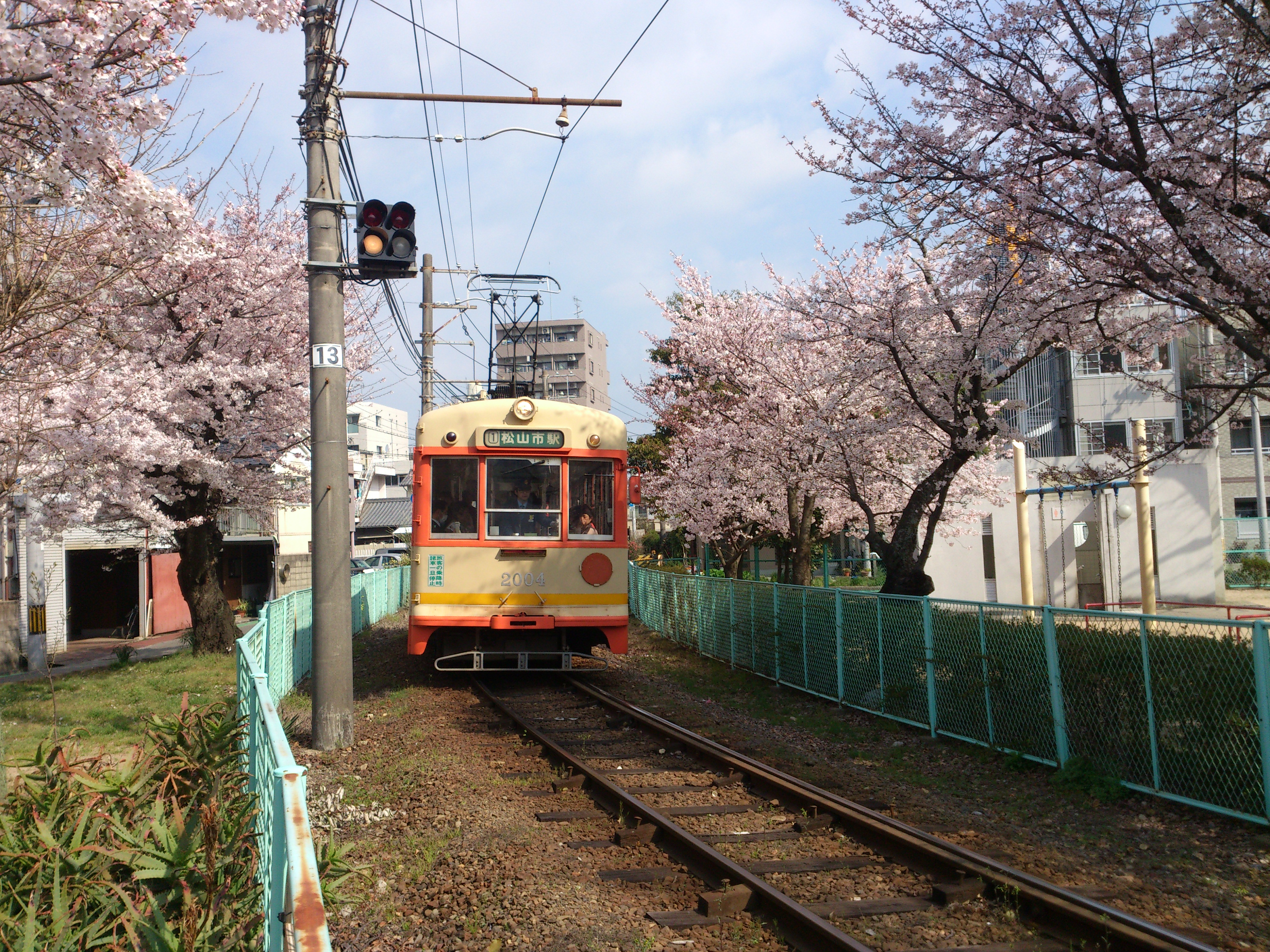 伊予鉄道 城北線の電車です